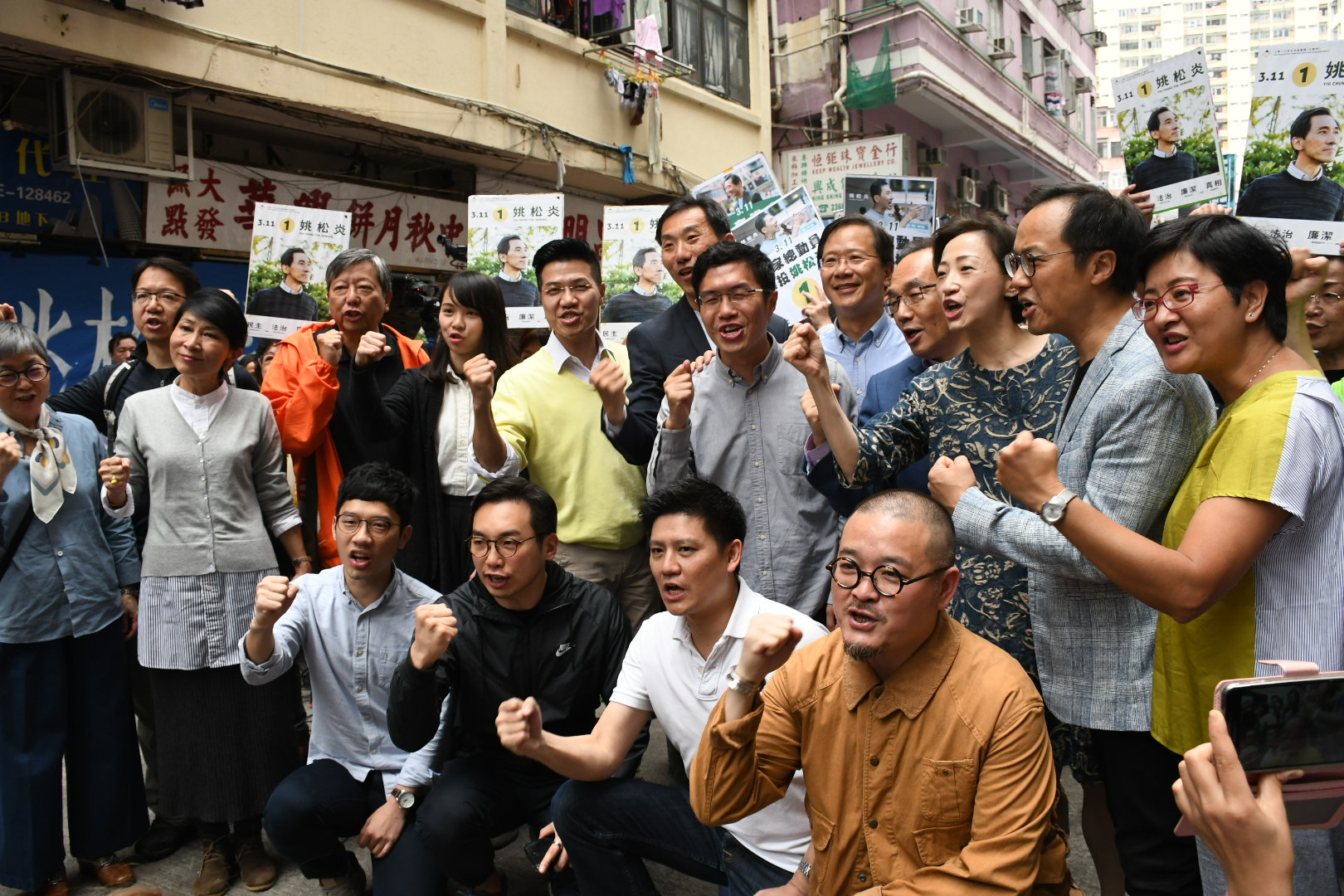 民主派立法會補選九龍西候選人姚松炎造勢大會。